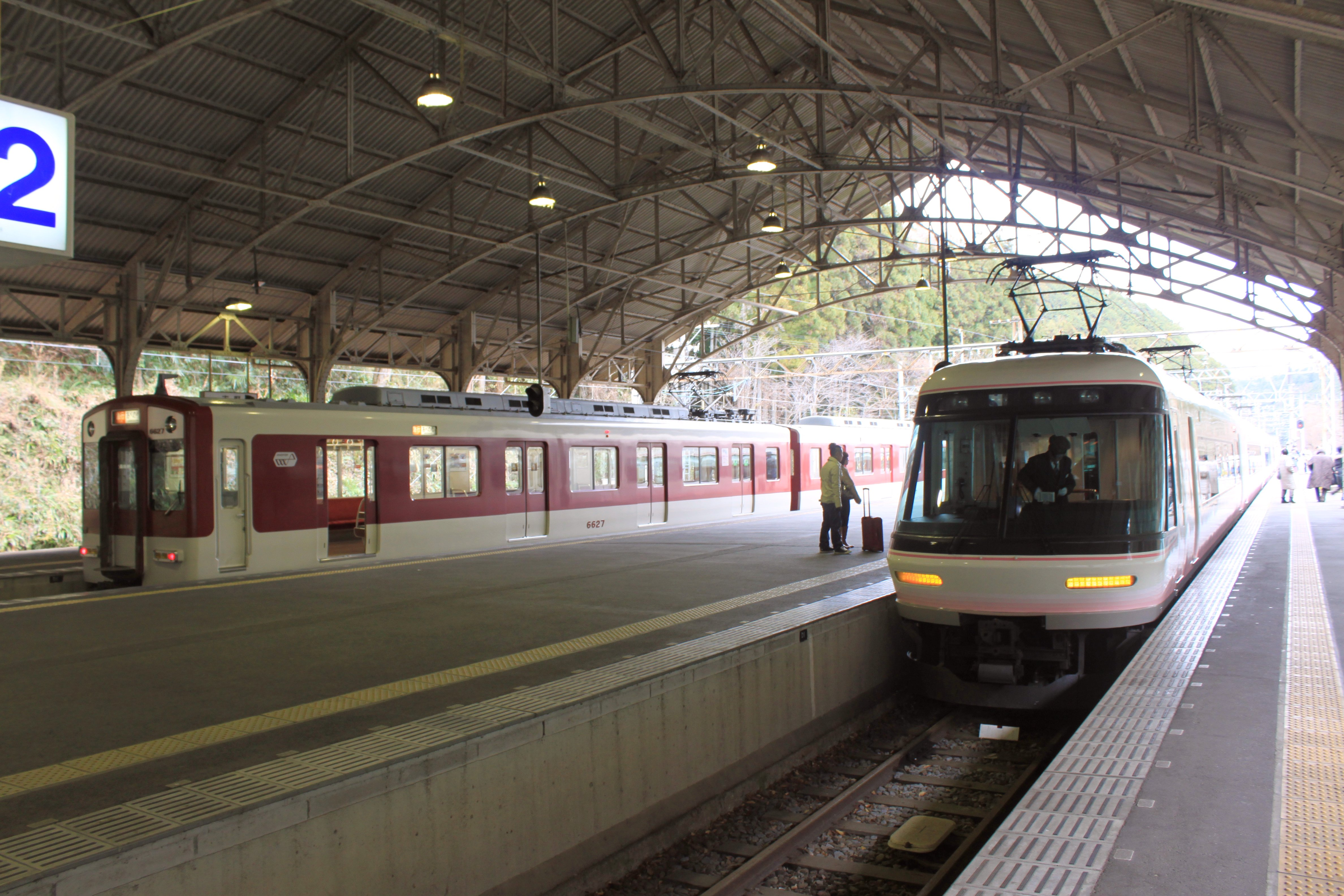 吉野駅